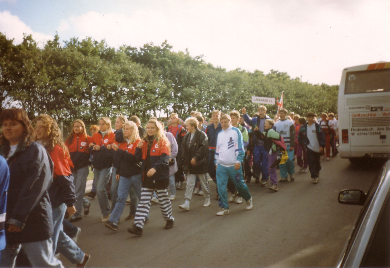 Dana Cup